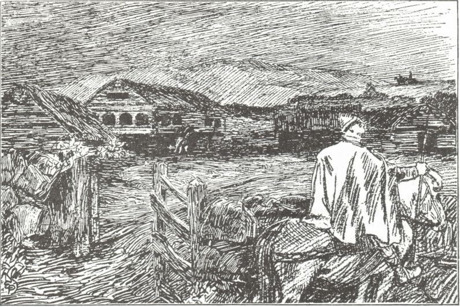 Eilif Peterssen: Illustration for Magnus Blindes og Harald Gilles saga, Heimskringla 1899-edition. nn: «Vaktmenn heldt hestevakt på alle vegar frå garden.»